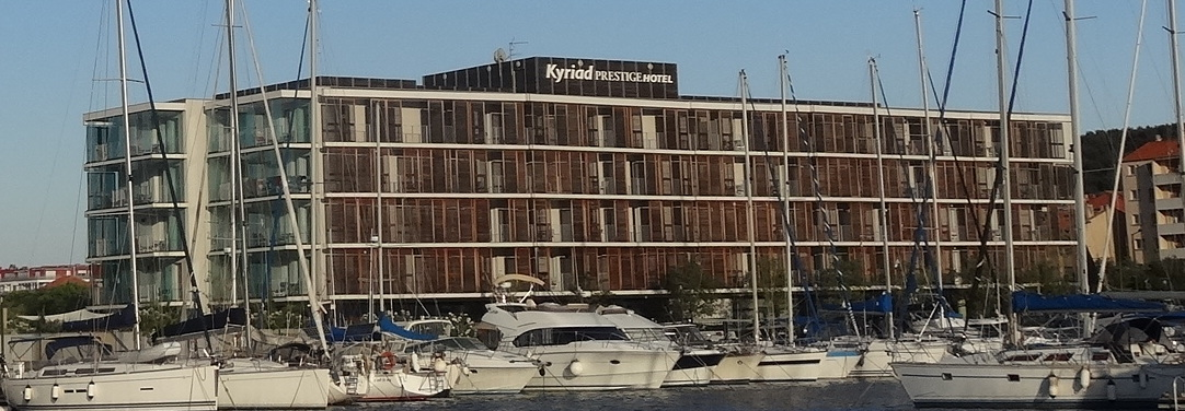 Port de La Seyne-sur-Mer. Hôtel Kyriad Prestige.